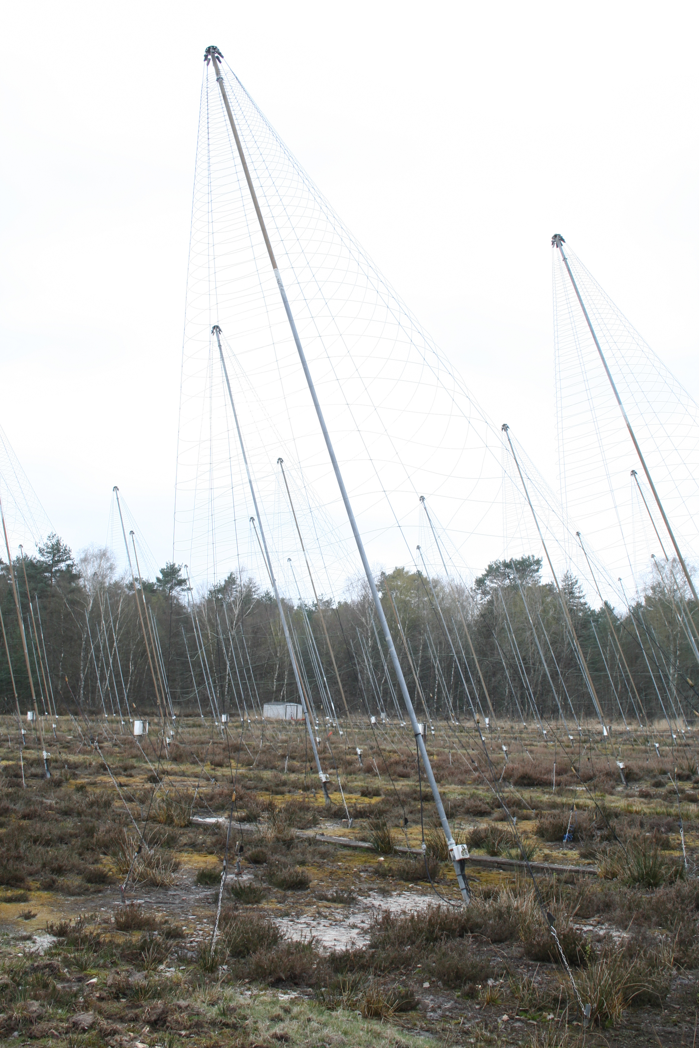 Antennes du réseau décamétrique de l'observatoire de Nançay